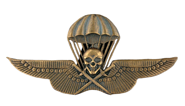 Magyar Királyi Honvédség Ejtőernyős Jelvény bronz változat